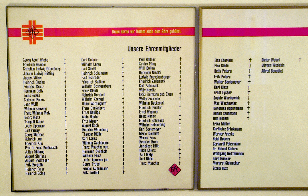 Tafeln der Ehrenmitglieder des Vereins für Leibesübungen von 1848 Hannover, darunter unter anderem auch Carl Loges.